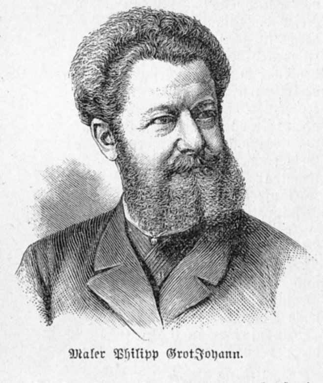 Porträt Philipp Grot Johann